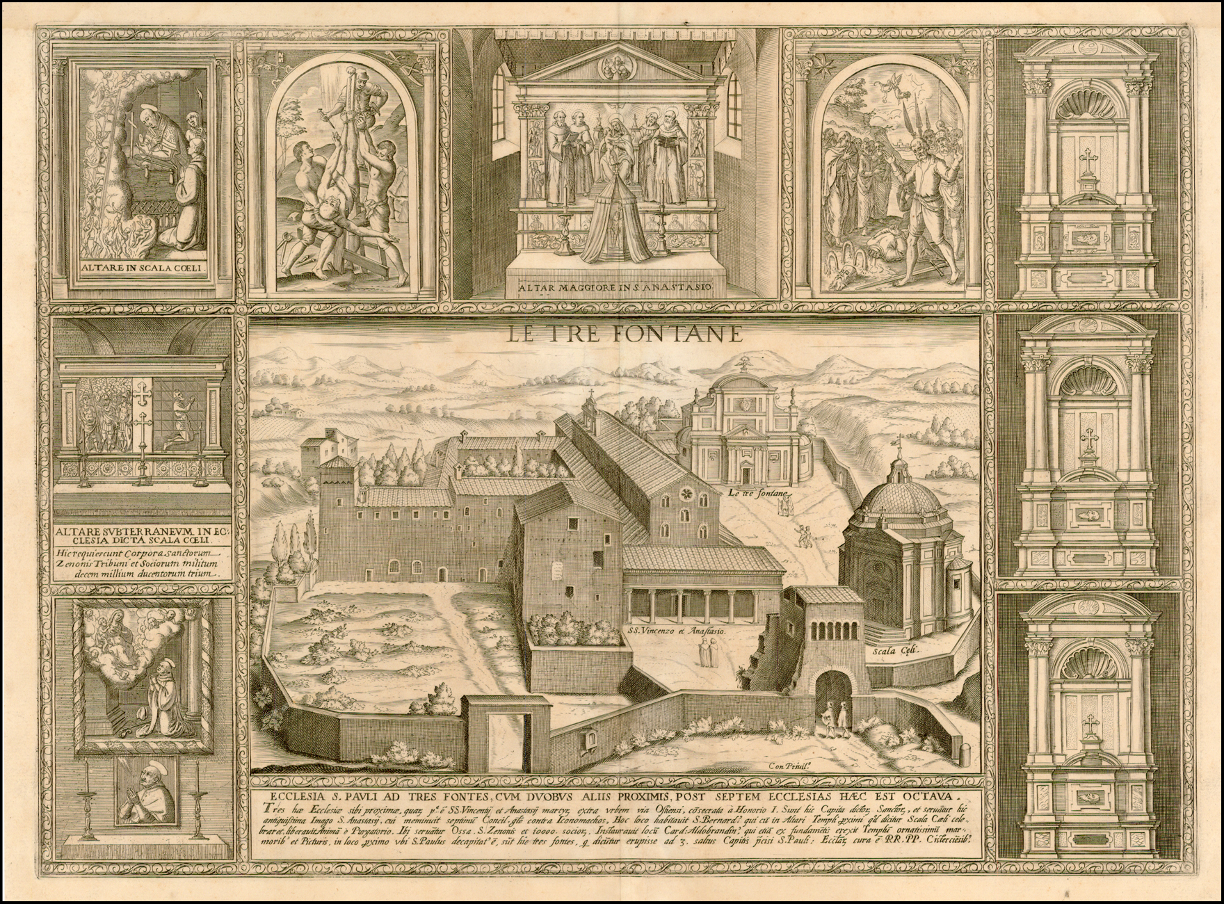 Incisione di Maggi